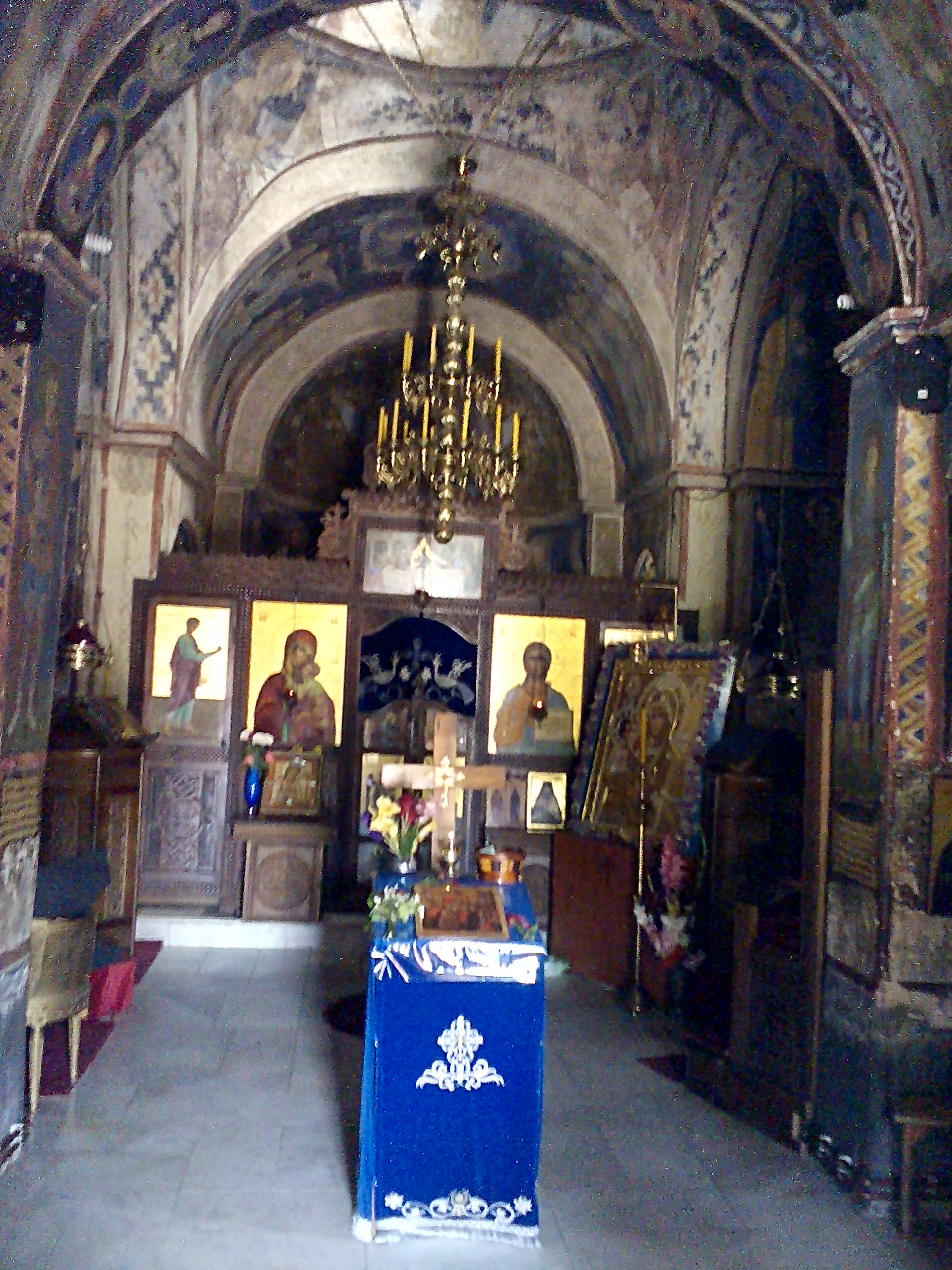 Миљков манастир (раније манастир Буковица) недалеко од села Гложане код Свилајнца